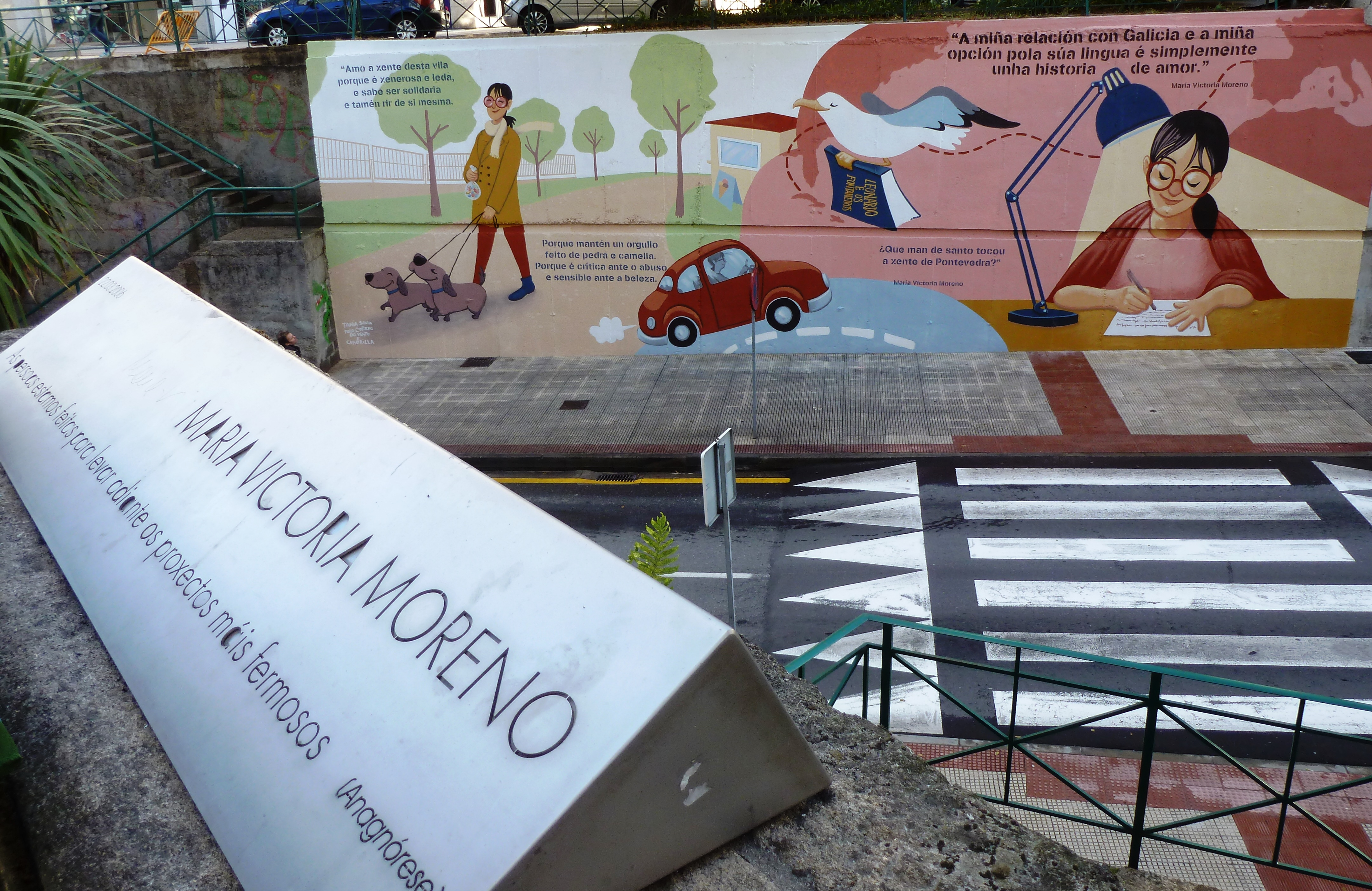 Mural de homenaxe a Mª Victoria Moreno inaugurado o 27/10/2018, obra de Tania Solla e Polo Correo do Vento. Rúa Eduardo Pondal de Pontevedra